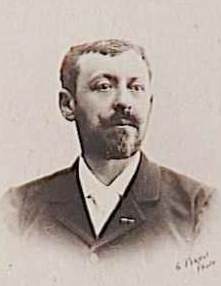 Portrait du peintre Frédéric Montenard